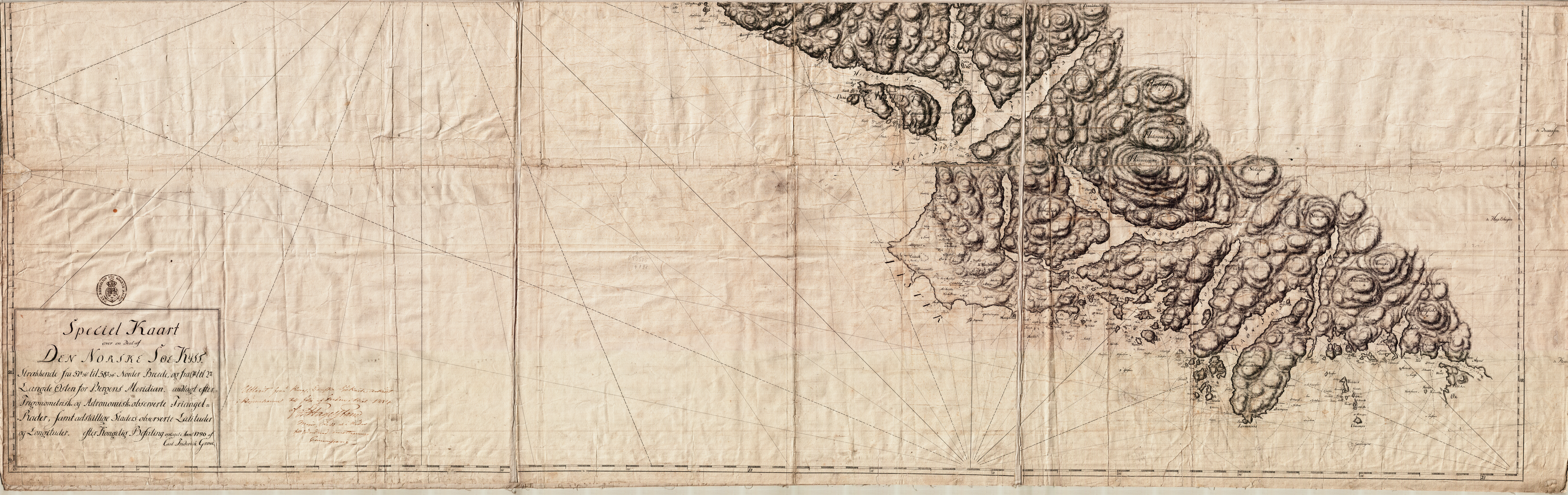 Nedre del av et sjøkart over sørkysten av Norge, fra Hille til Varhaug, fra 1796. Håndtegnet av Carl Friderich Grove i omtrentlig målestokk 1:73 000. Originalstørrelse på denne delen av kartet er ca 181 x 57 cm. Et eksemplar befinner seg hos Statens kartverk Sjø i Stavanger.